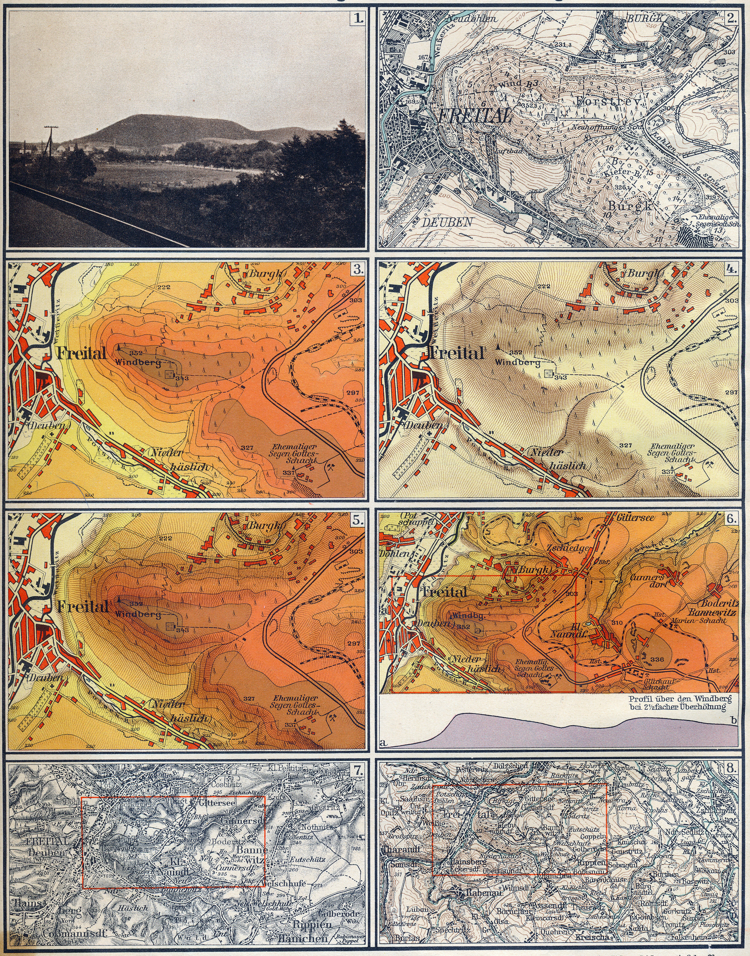 Geländedarstellung: Gebiet des Windbergs (Freital, Sachsen), 1. Naturaufnahme, 2. Meßtischblattdarstellung (1:25.000), 3. Farbige Höhenschichten (1:25.000), 4. Schraffen (1:25.000), 5. Farbige Höhenschichten mit Schraffen (1:25.000), 6. Farbige Höhenschichten mit Schraffen (1:50.000), 7. Darstellung der Reichskarte (1:100.000), 8. Darstellung der amtlichen Karte (1:200.000) This is a part of an old atlas. It does not represent the current situation.